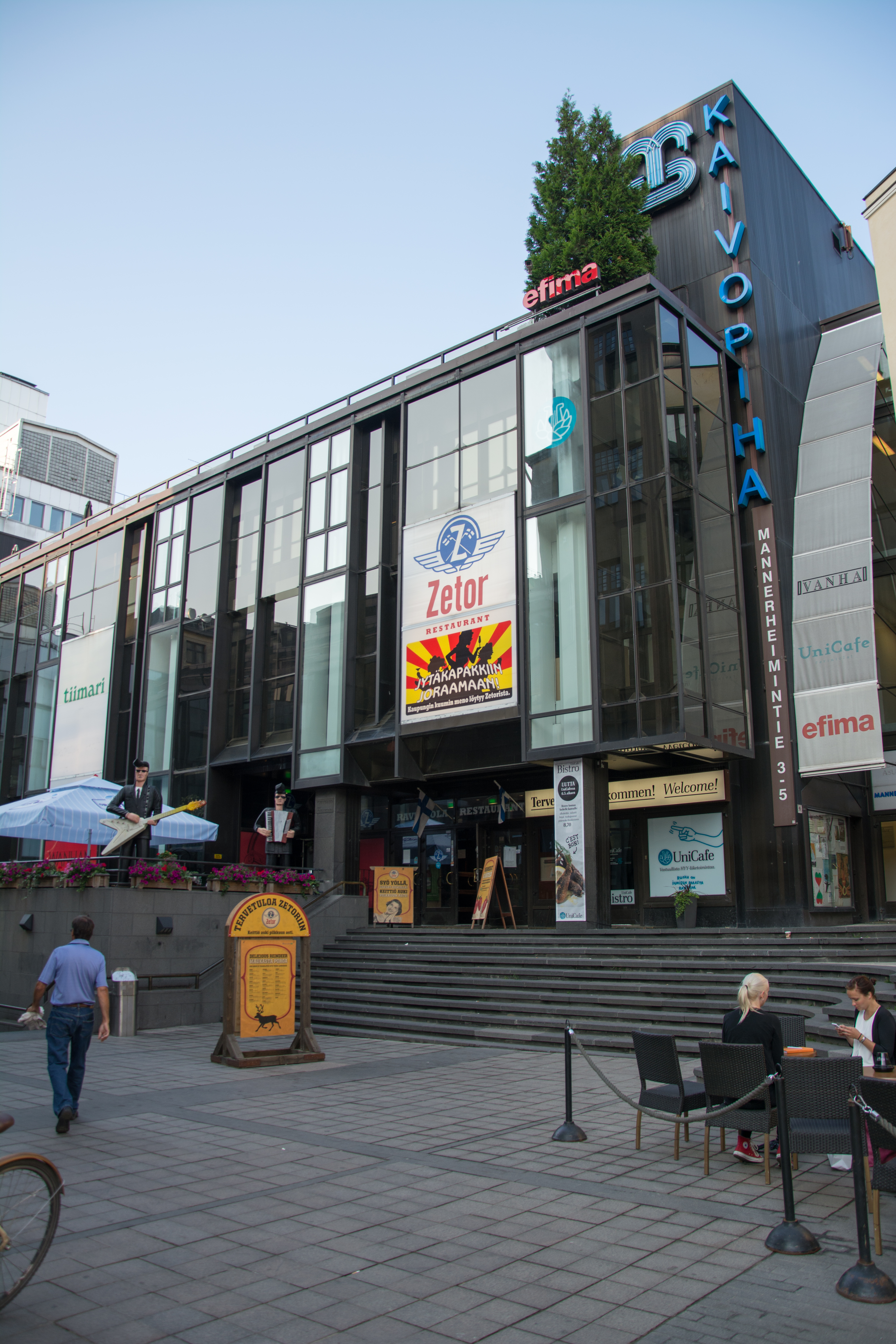 Ravintola Zetor Helsingissä